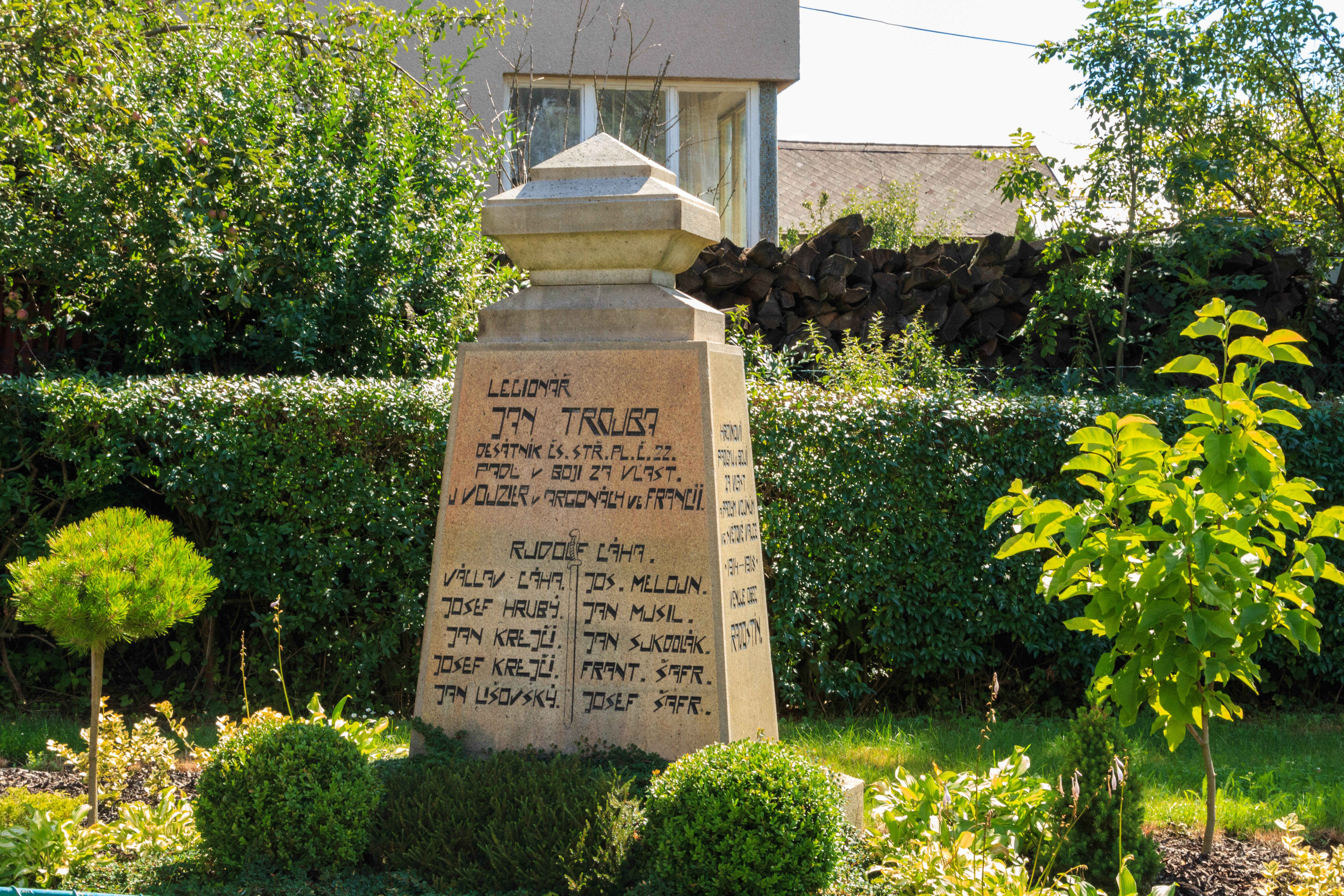 Radostín u Havlíčkova Brodu - pomník padlých